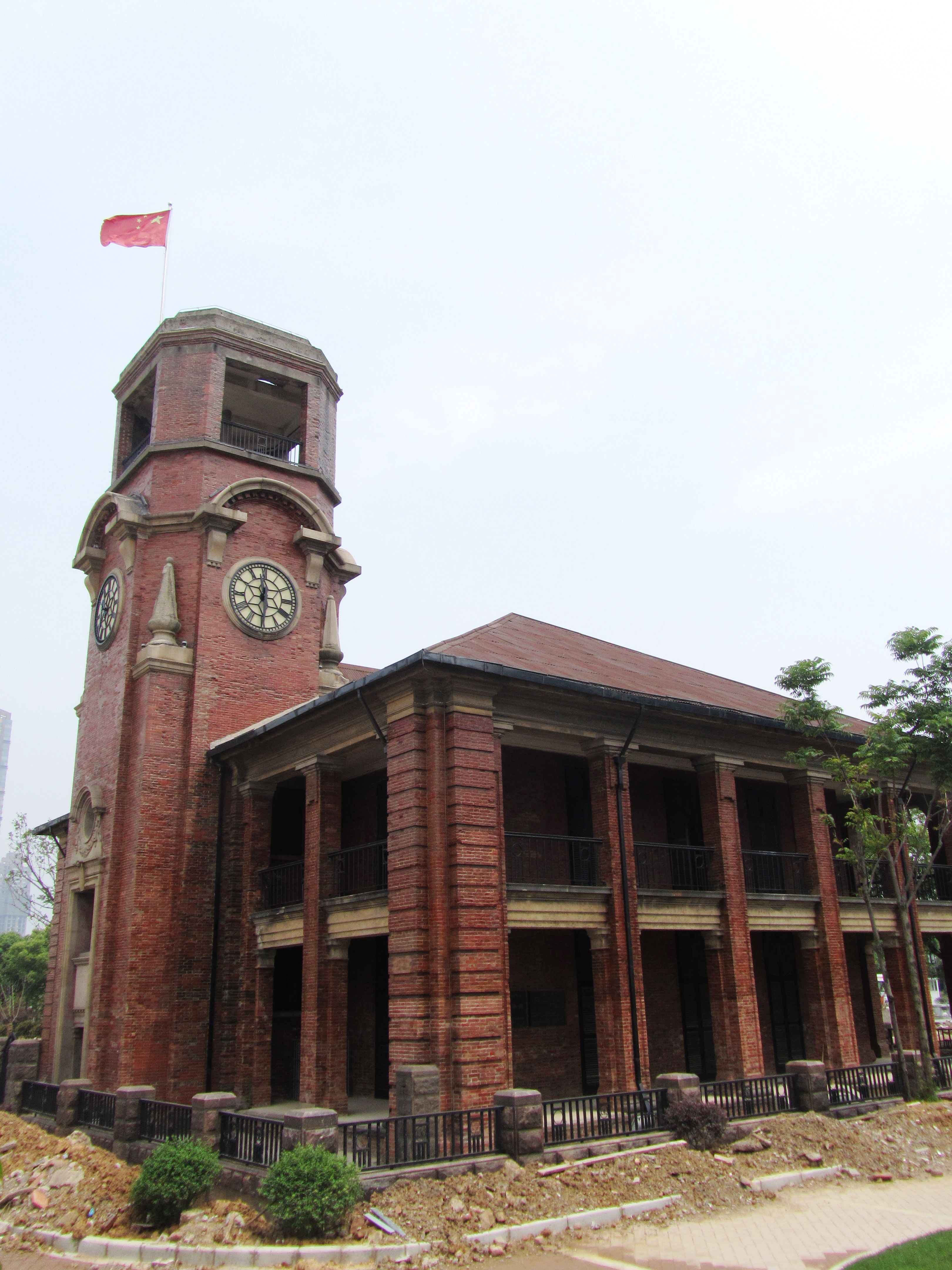 芜湖海关旧址，自西南方向看。